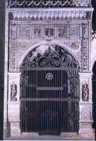 Capilla de la Anunciación o de la Purisima.